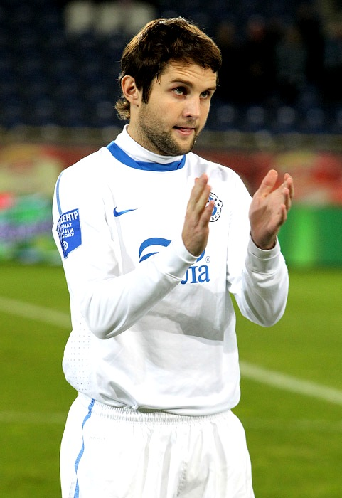 Перед матчем с ФК "Черноморец"